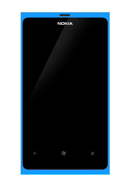 Nokia Lumia 800 de couleur bleu - Il s'agit de mon travail (libre de droits)